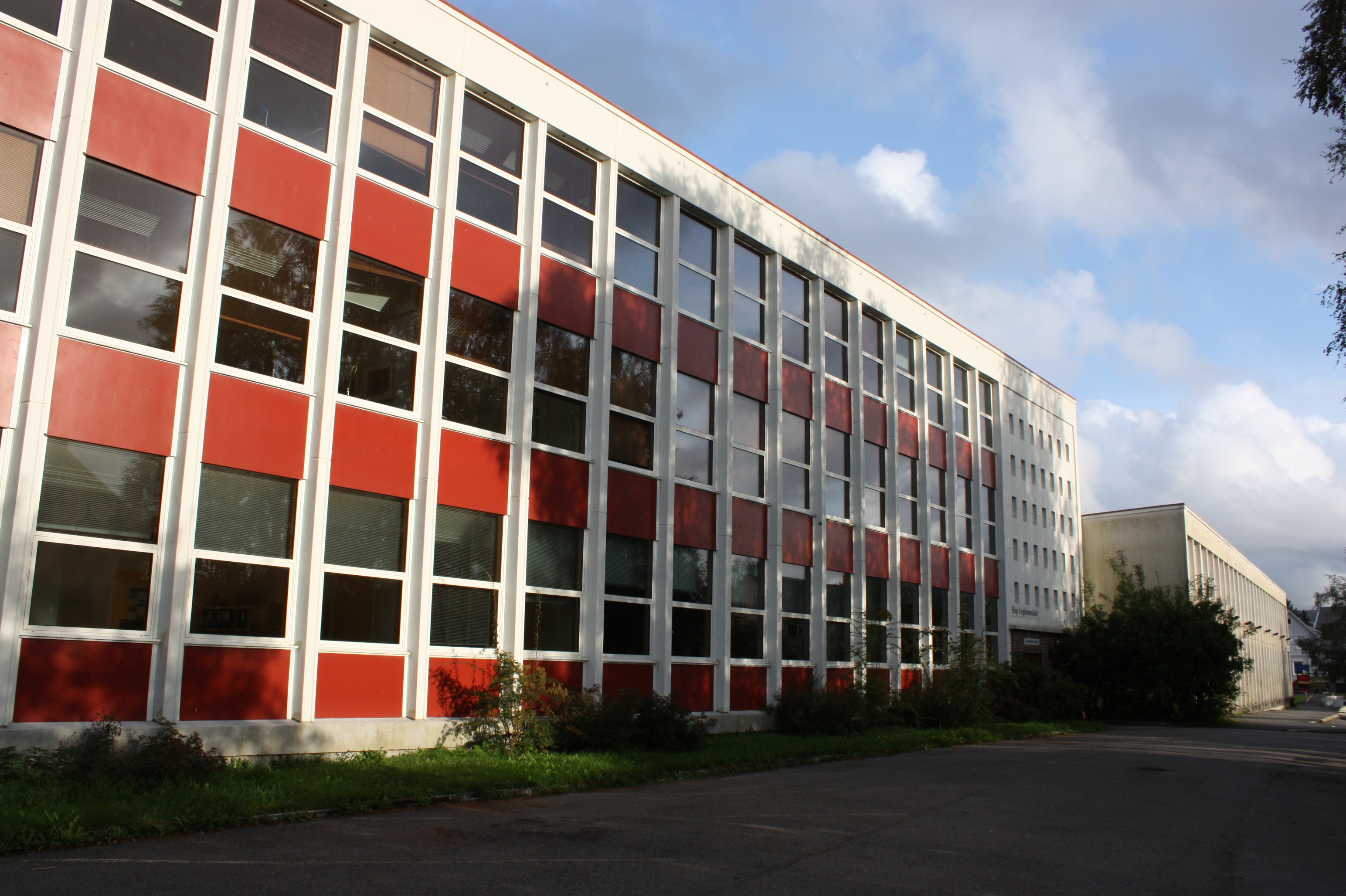 Hop ungdomsskule, Fana, Bergen.